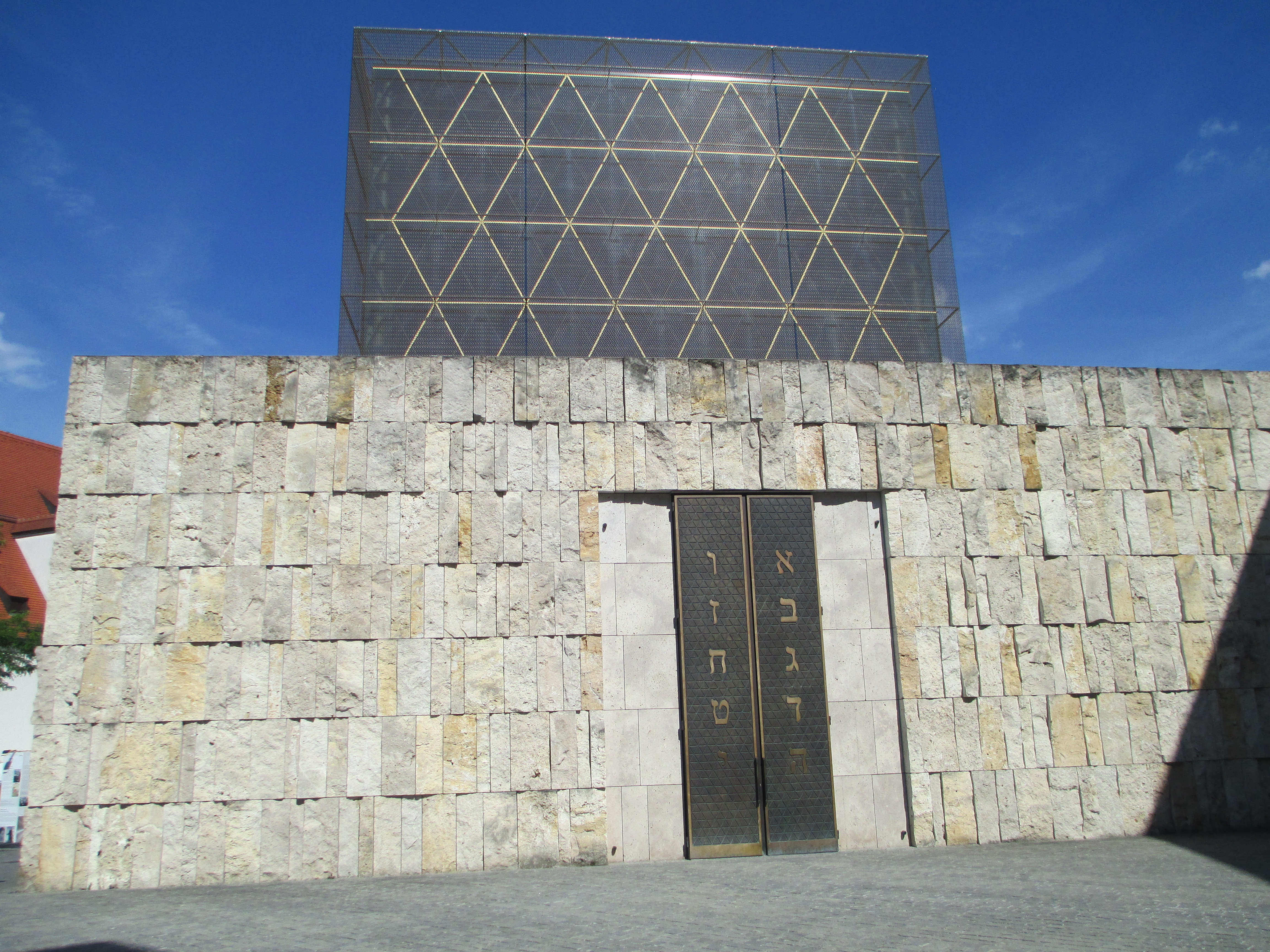 בית הכנסת אהל יעקב החדש במינכן